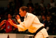 Marie Muller em acao